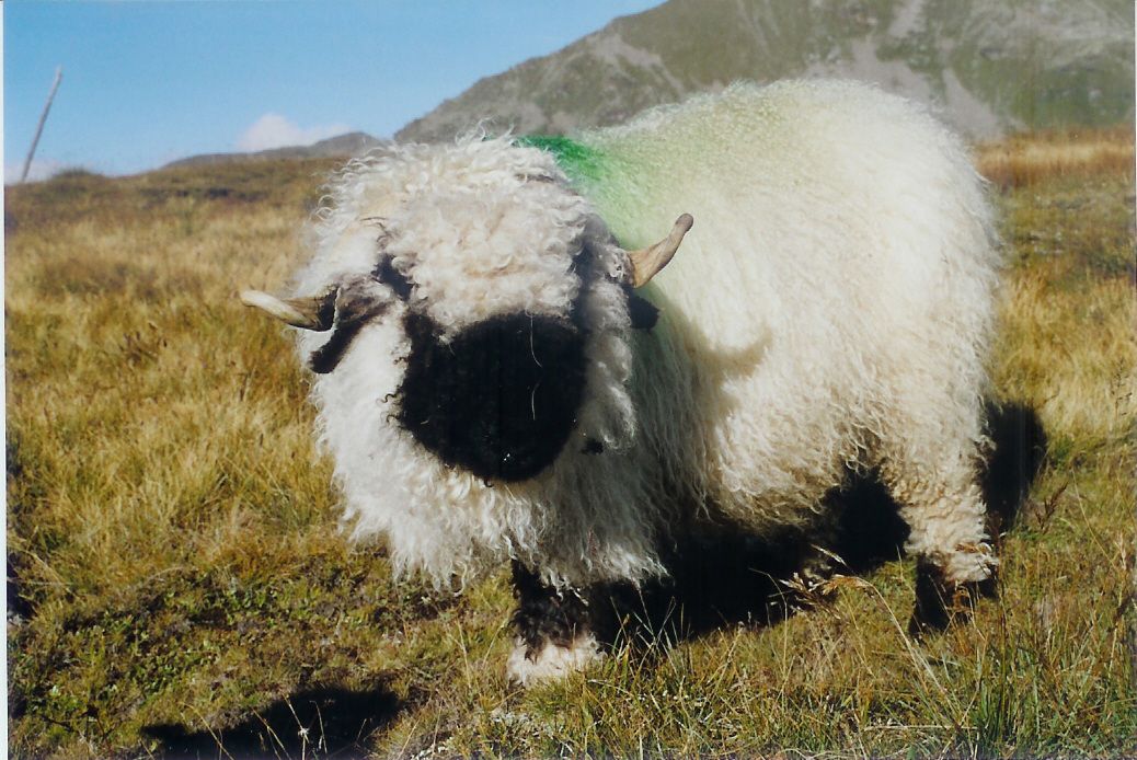 Walliser Schwarznasenschaf